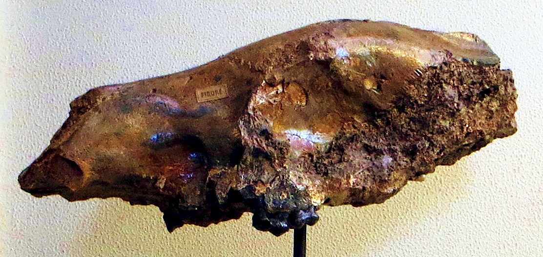 Fossil of Cynelos, an extinct mammal - Took the photo at Musee d'Histoire Naturelle, Paris